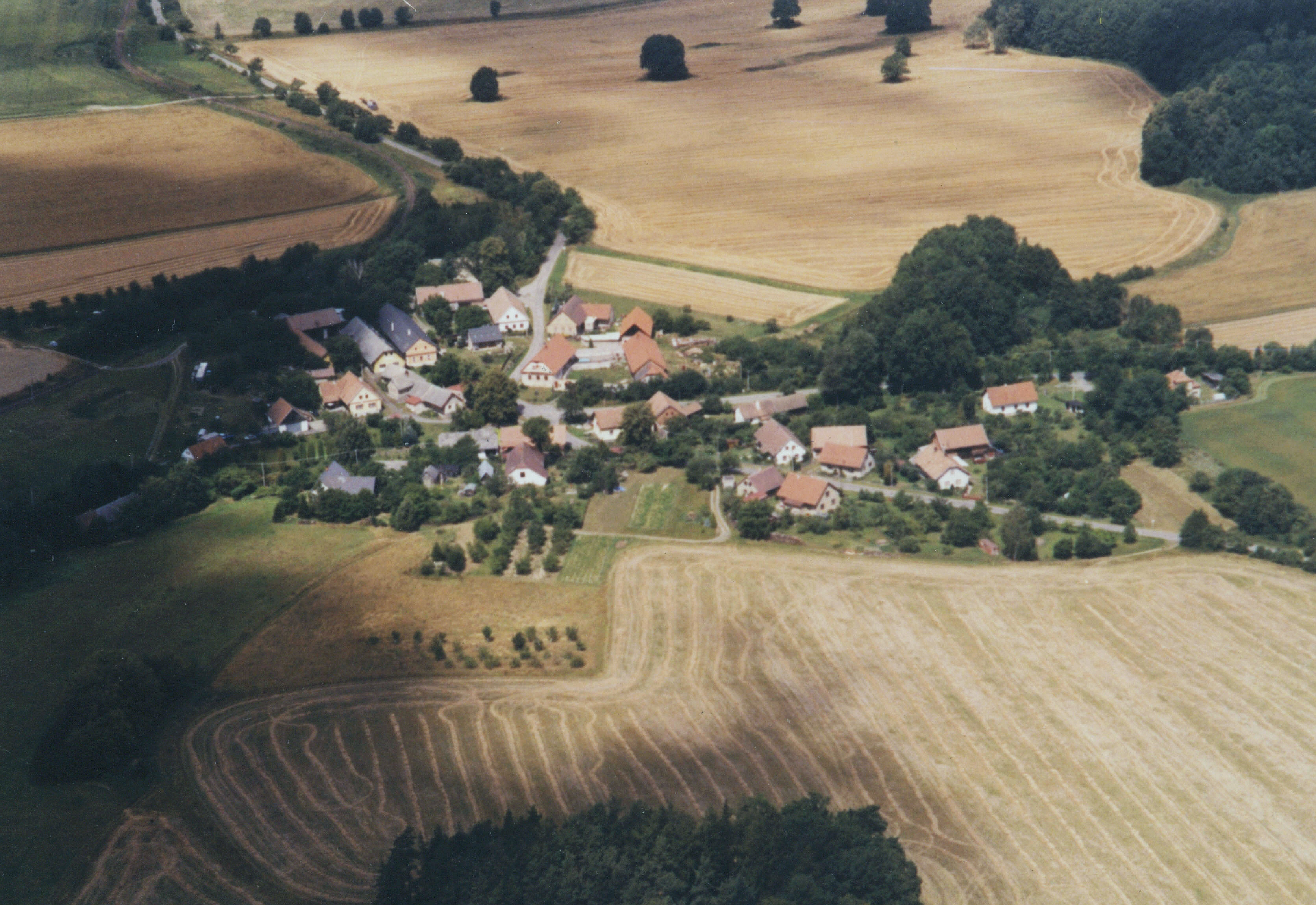 Letecký pohled na Lešany